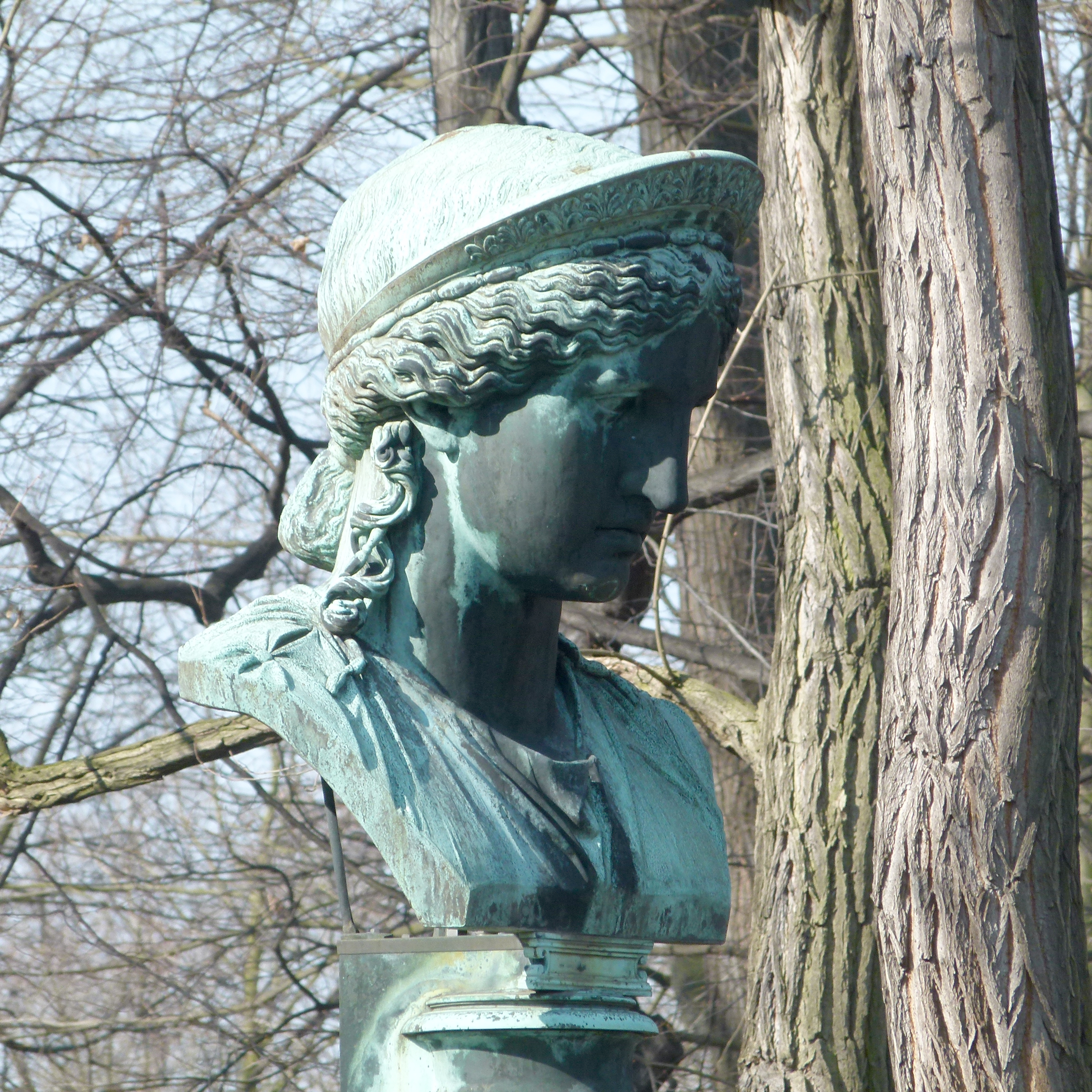 Bronzener Abguss der Juno Ludovisi im Englischen Garten von Schloss Pillnitz, Dresden